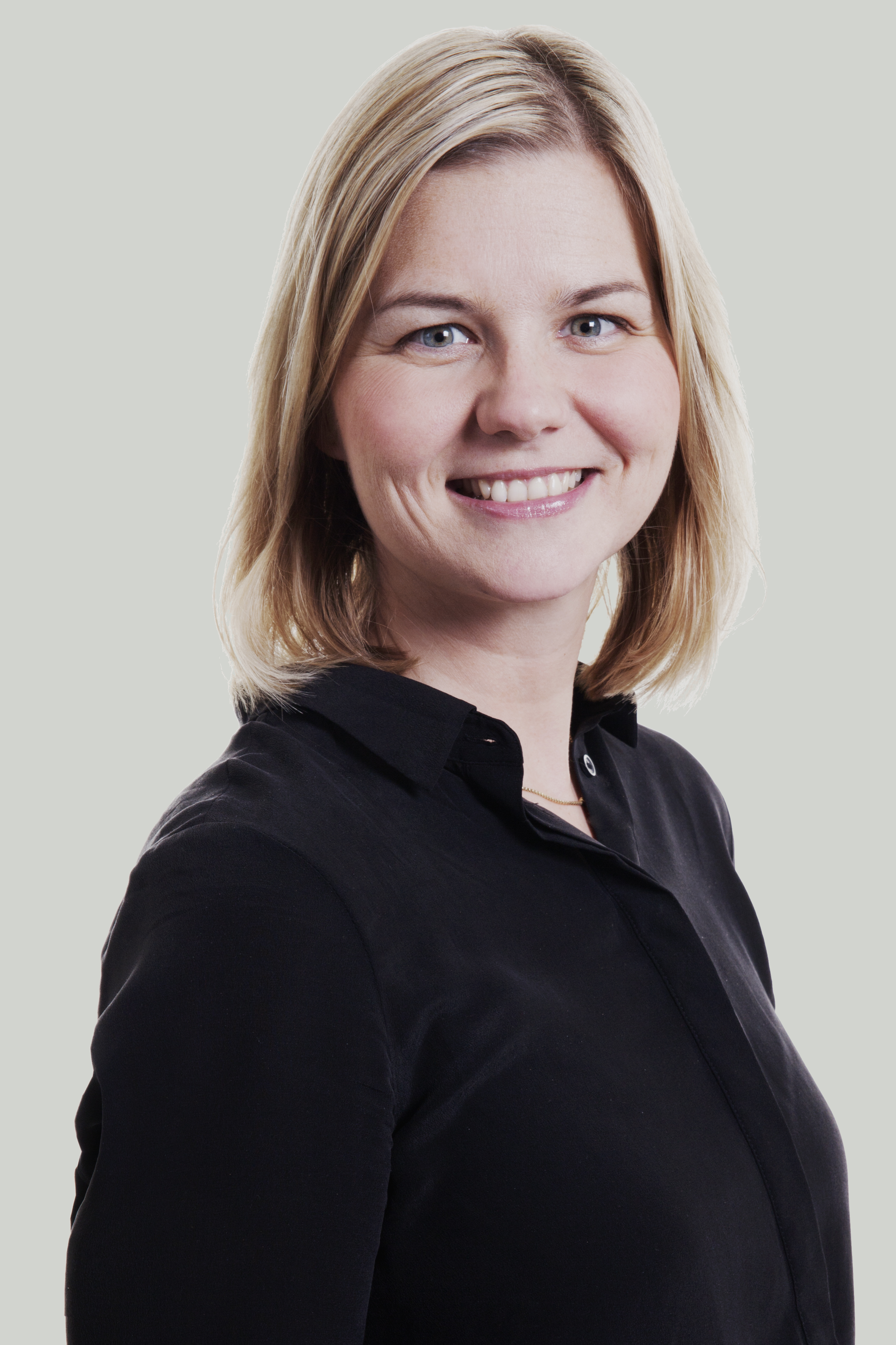 Guri Melby